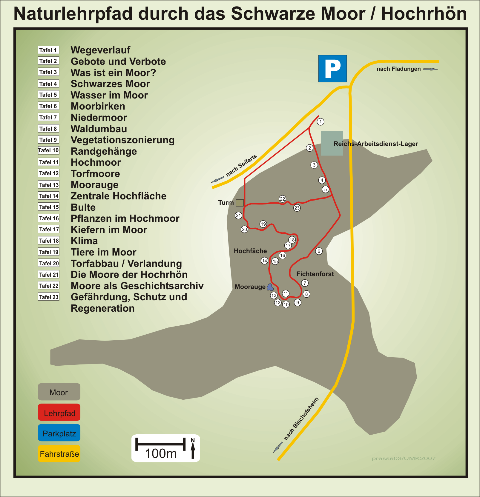 Karte Lehrpfad durch das Schwarze Moor in der Hochrhön, Deutschland